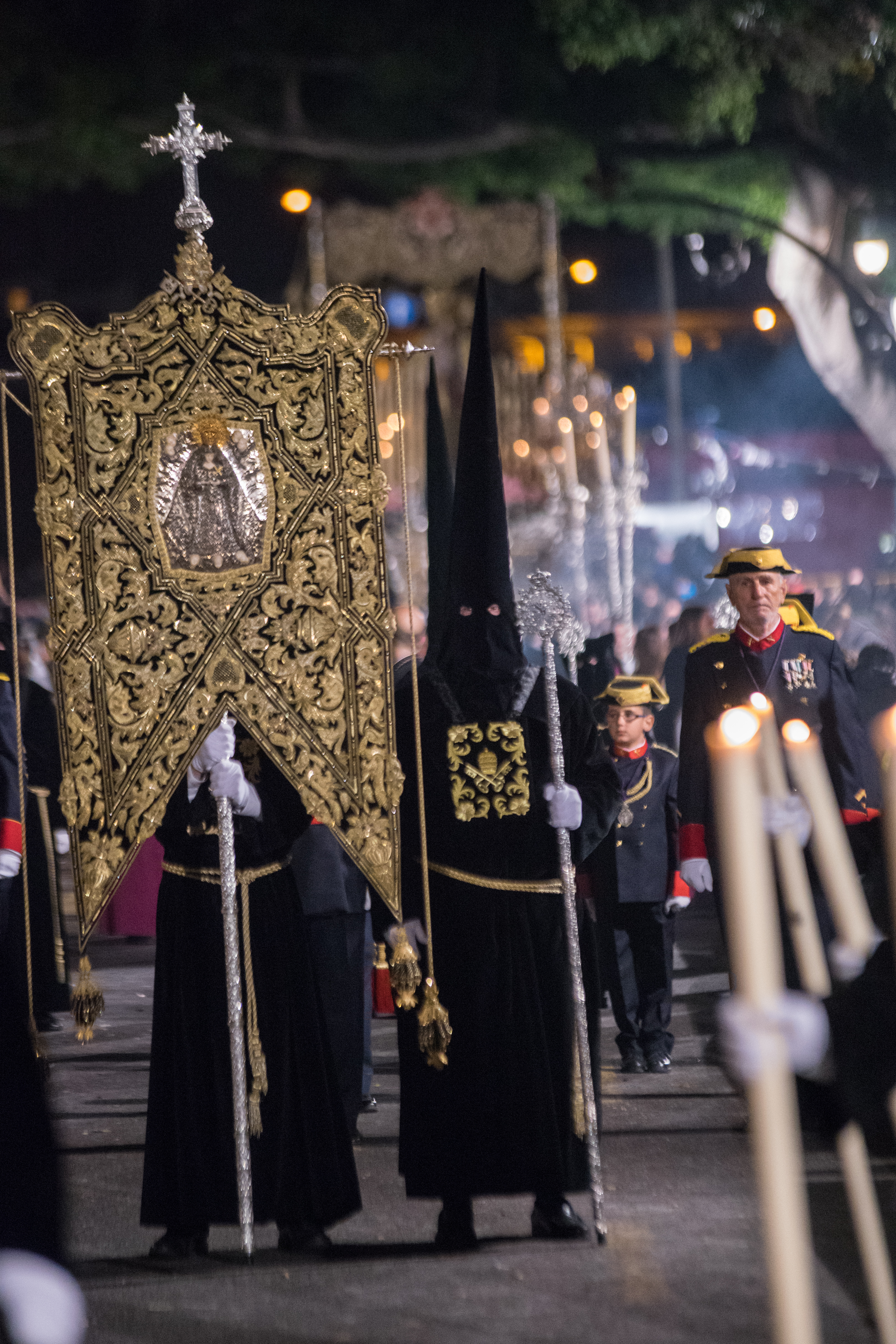 Pontificia, Real, Ilustre y Venerable Archicofradía Sacramental de Culto y Procesión del Santísimo Cristo de la Expiración y María Santísima de los Dolores Coronada This is a photography of a Folklore festival in Spain (Wikidata id Q9075883).